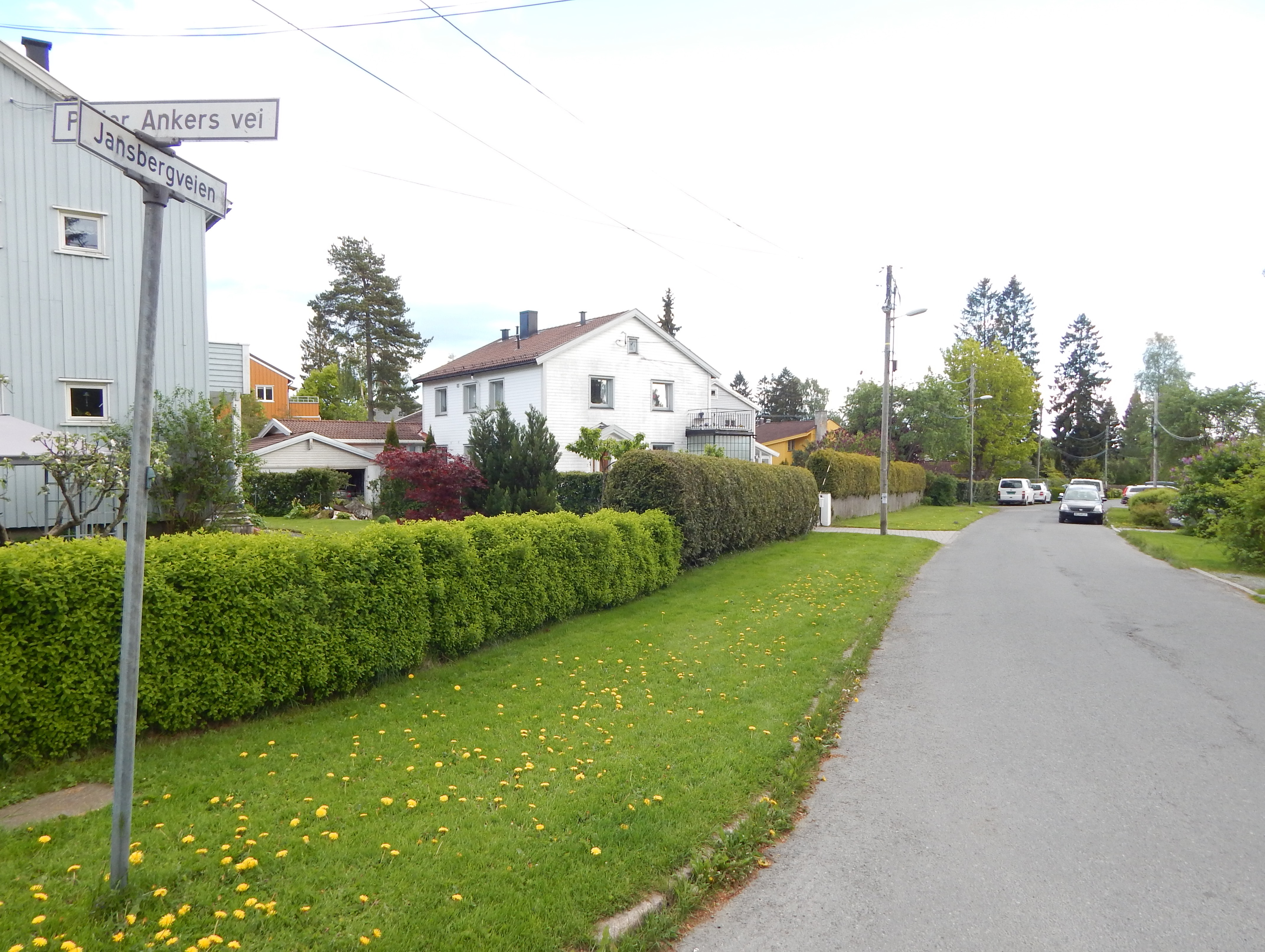 Jansbergveien